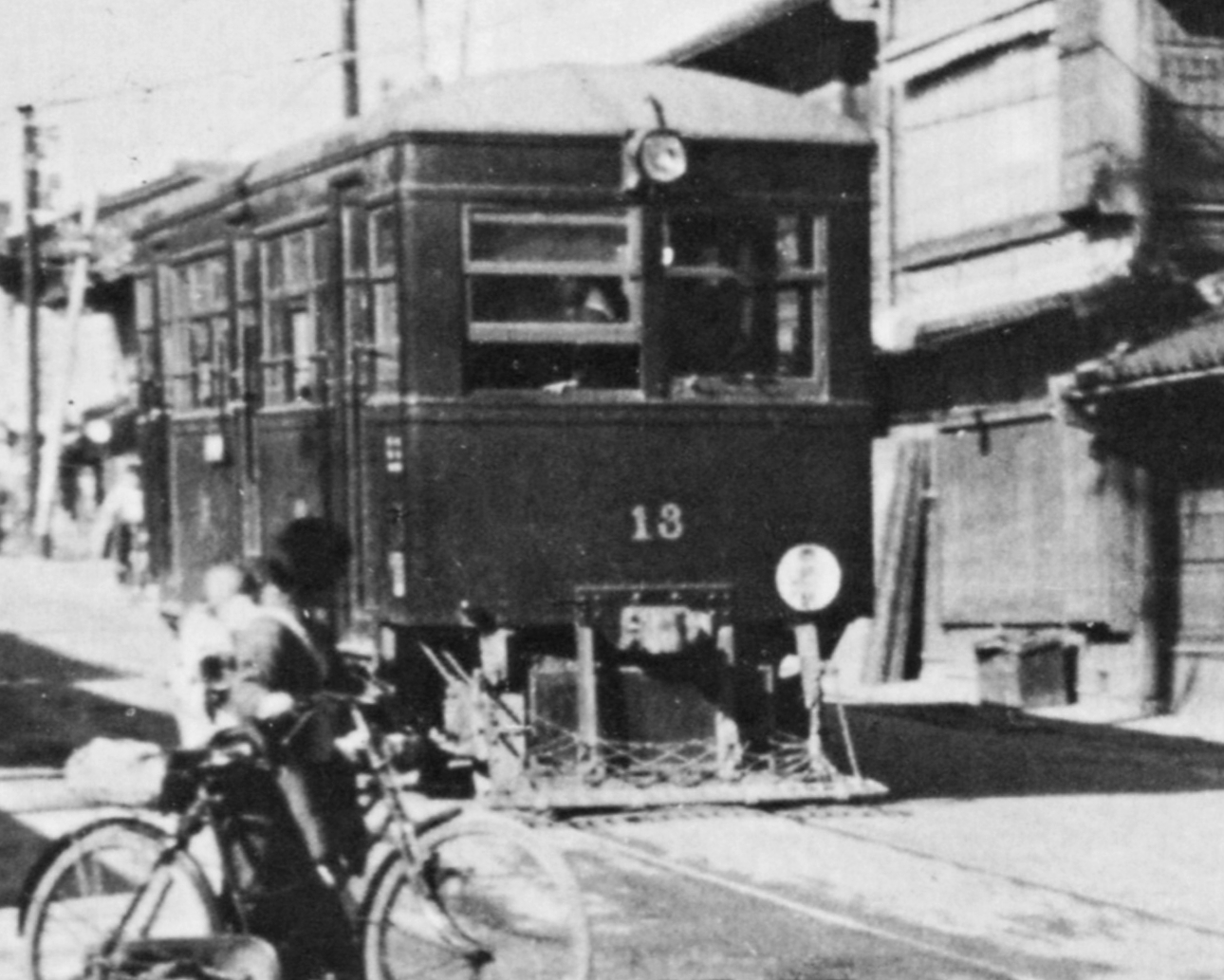 三河鉄道キ10形